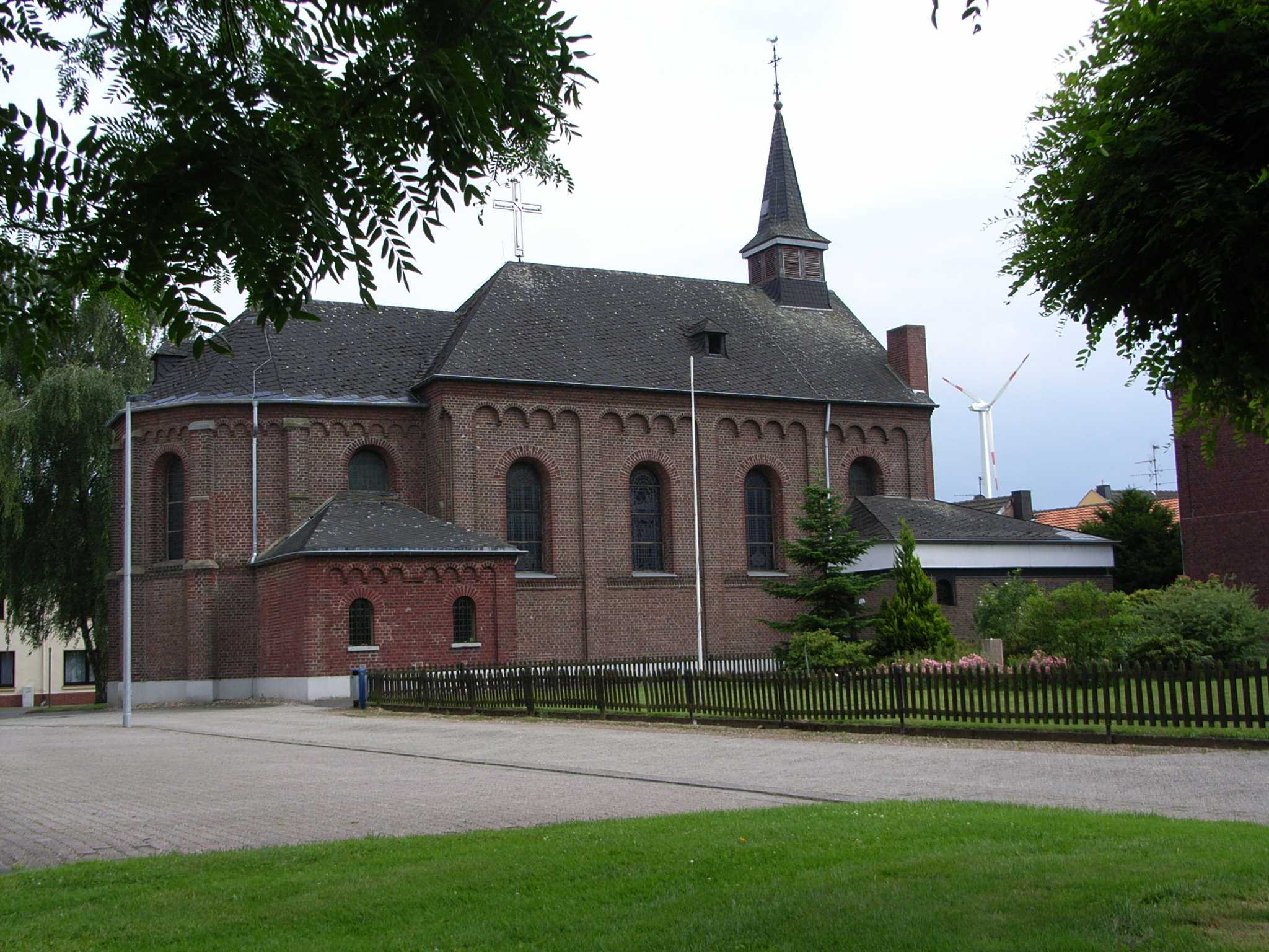 Pfarrkirche St. Laurentius mit Neonkreuz und Windmühle, Erkelenz-Houverath